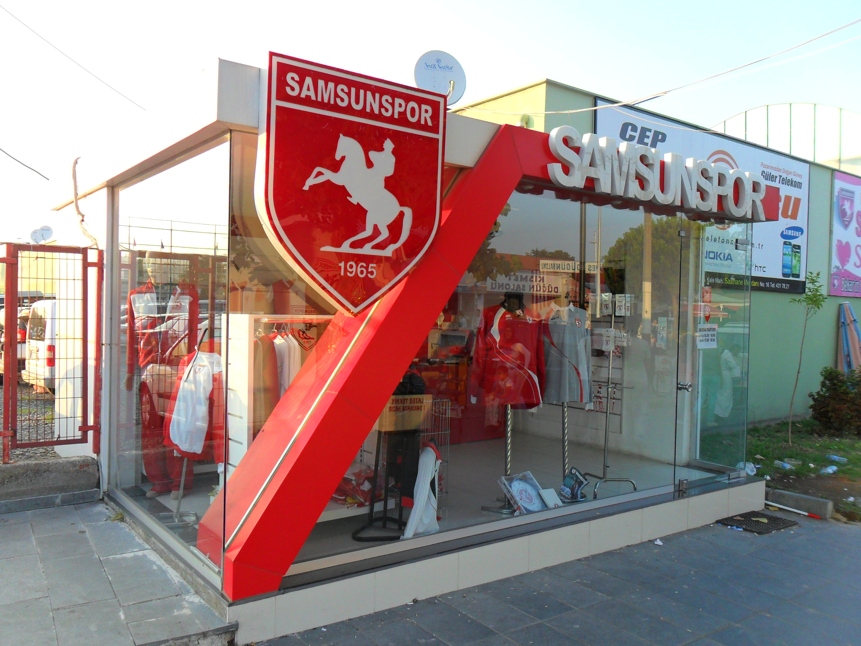 Samsunspor Store Uluslararası Yabancılar Pazarı şubesi.